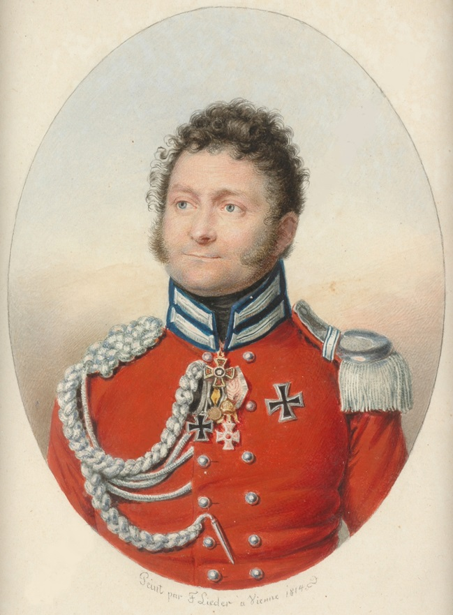 Wilhelm Werner Otto von Schwerin as Aide-de-Camp (Flügeladjutant) of King Friedrich Wilhelm III., 1814 watercolor by Friedrich Johann Gottlieb Lieder